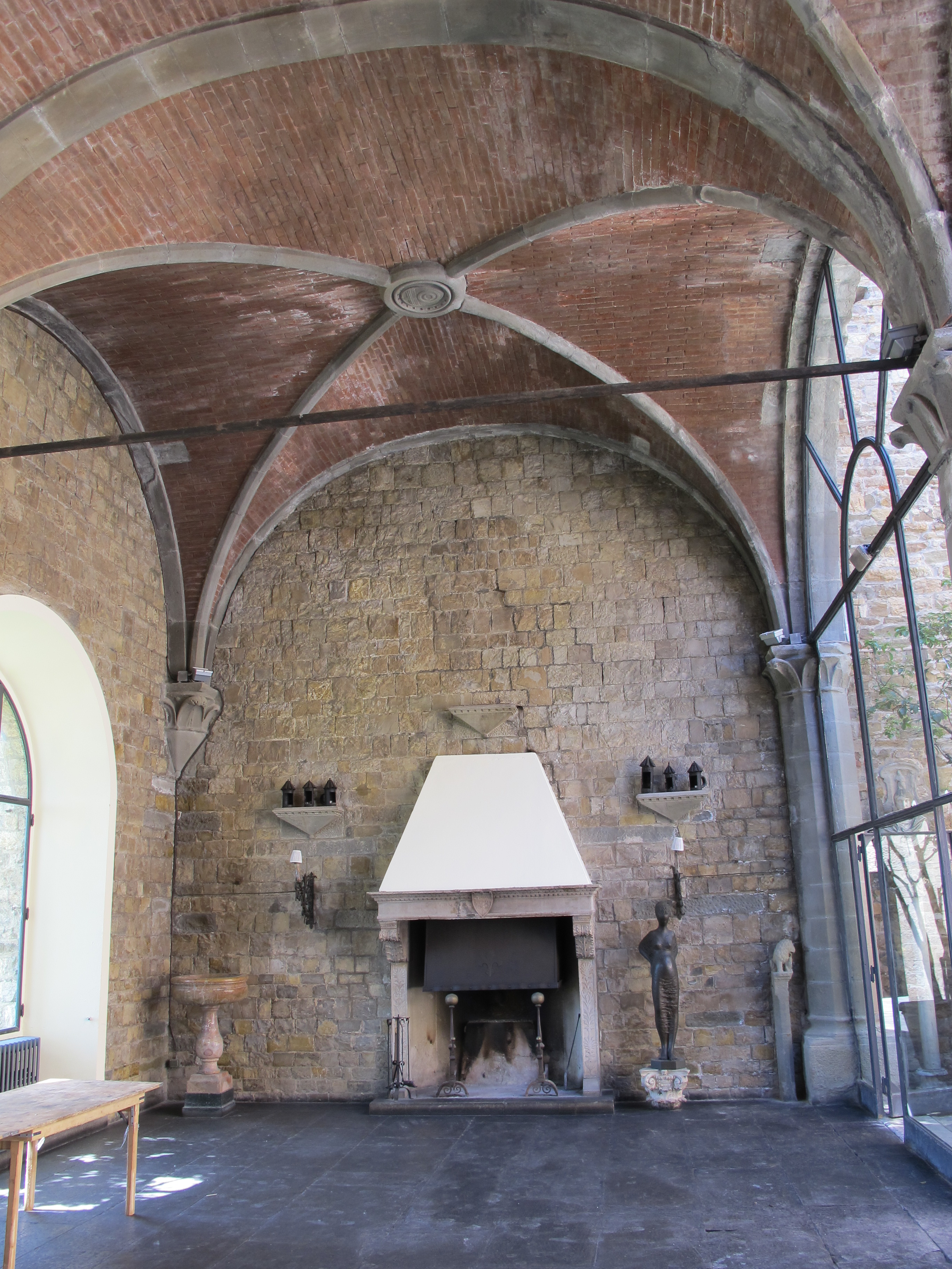 Castello di vincigliata, interno, salone